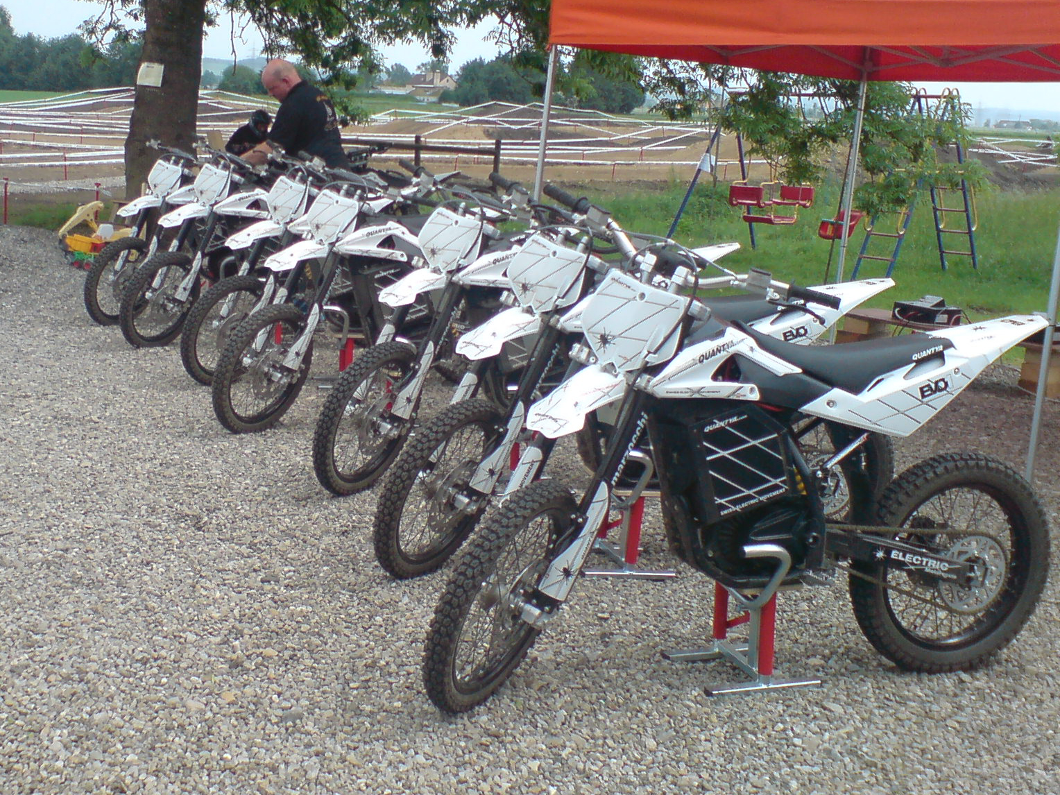 Quantya Track Elektromotorräder